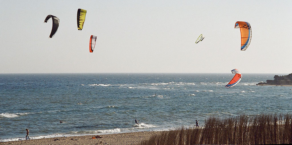 Kite-Surfer am Kap Trafalgar nahe Los Caños de Meca siehe auch: Costa de la Luz, Provinz Cádiz, Andalusien, Spanien Manfred Werner (Benutzer:Tsui), September 2004